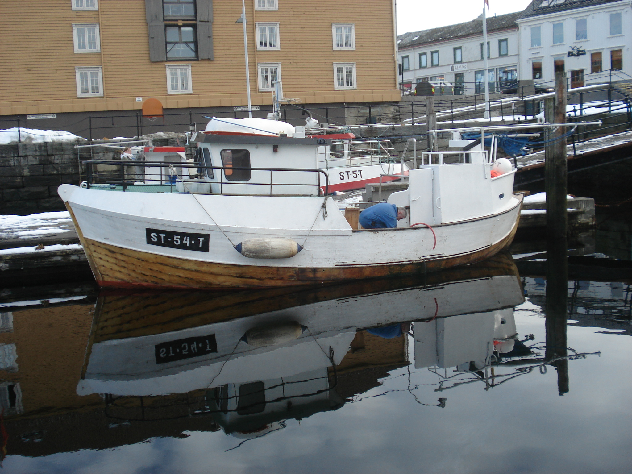 Sjark i Ravnkloa, Trondheim.